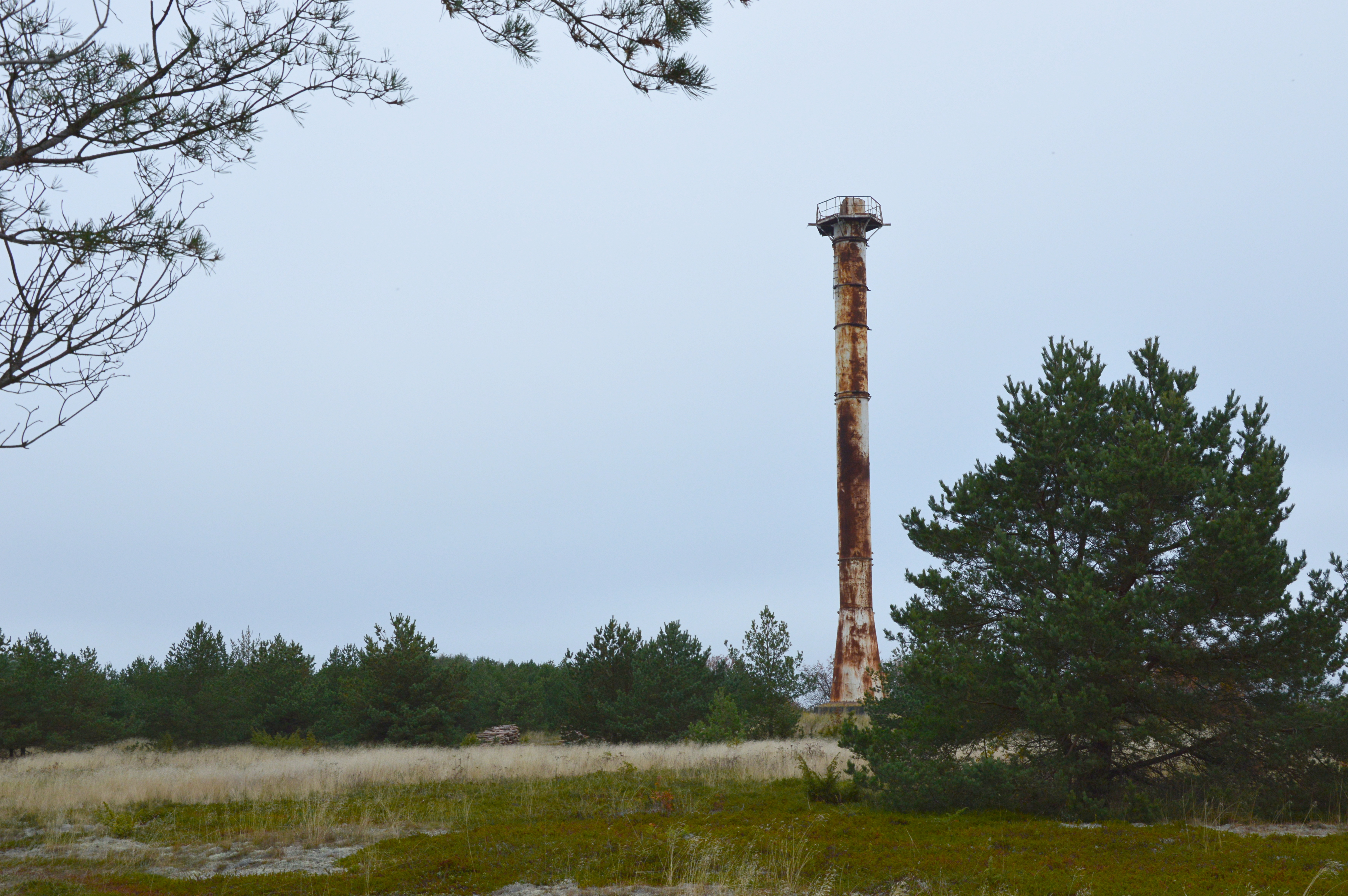 Tüüpprojekti järgi rajatud 30 meetri kõrgune metallsilindertorn, mis tegutses väga lühikest aega tuletornina. 1980ndate lõpus püstitatud ja 1990ndate algul siseseadest puhtaks tehtud rajatis murdus tormis 2017. aasta jaanuaris.